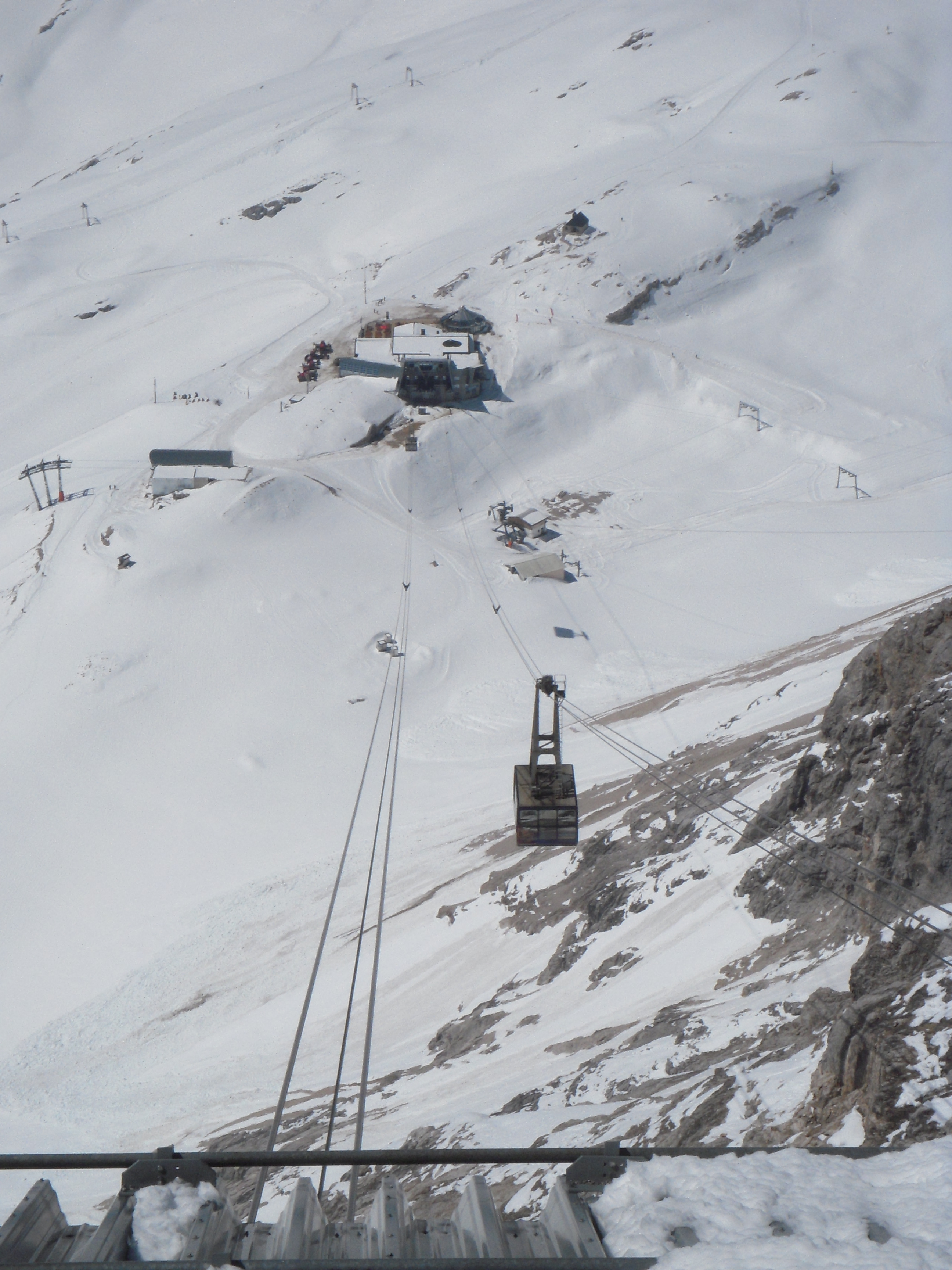 Svævebanen Zugspitz-Gletscherbahn set fra Zugspitze